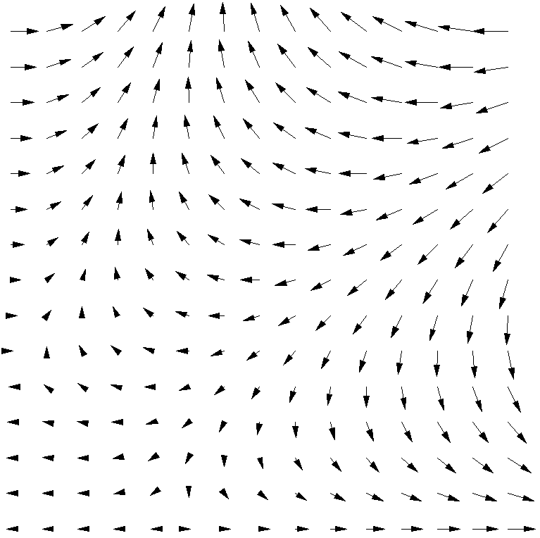 Esempio di campo vettoriale 2D.